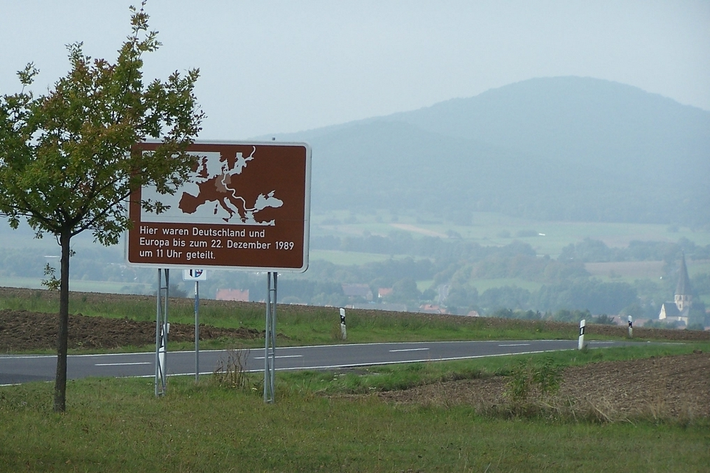 Blick vom „Blauen Haus“/„Point Alpha“ (Grenzmuseum/Gedenkstätte „Haus auf der Grenze“) an der einstigen Innerdeutschen Grenze nahe den ineinander übergehenden Landesstraßen 3170 (Hessen) und 1026 (Thüringen) über Rasdorf hinweg westwärts zum Stallberg.